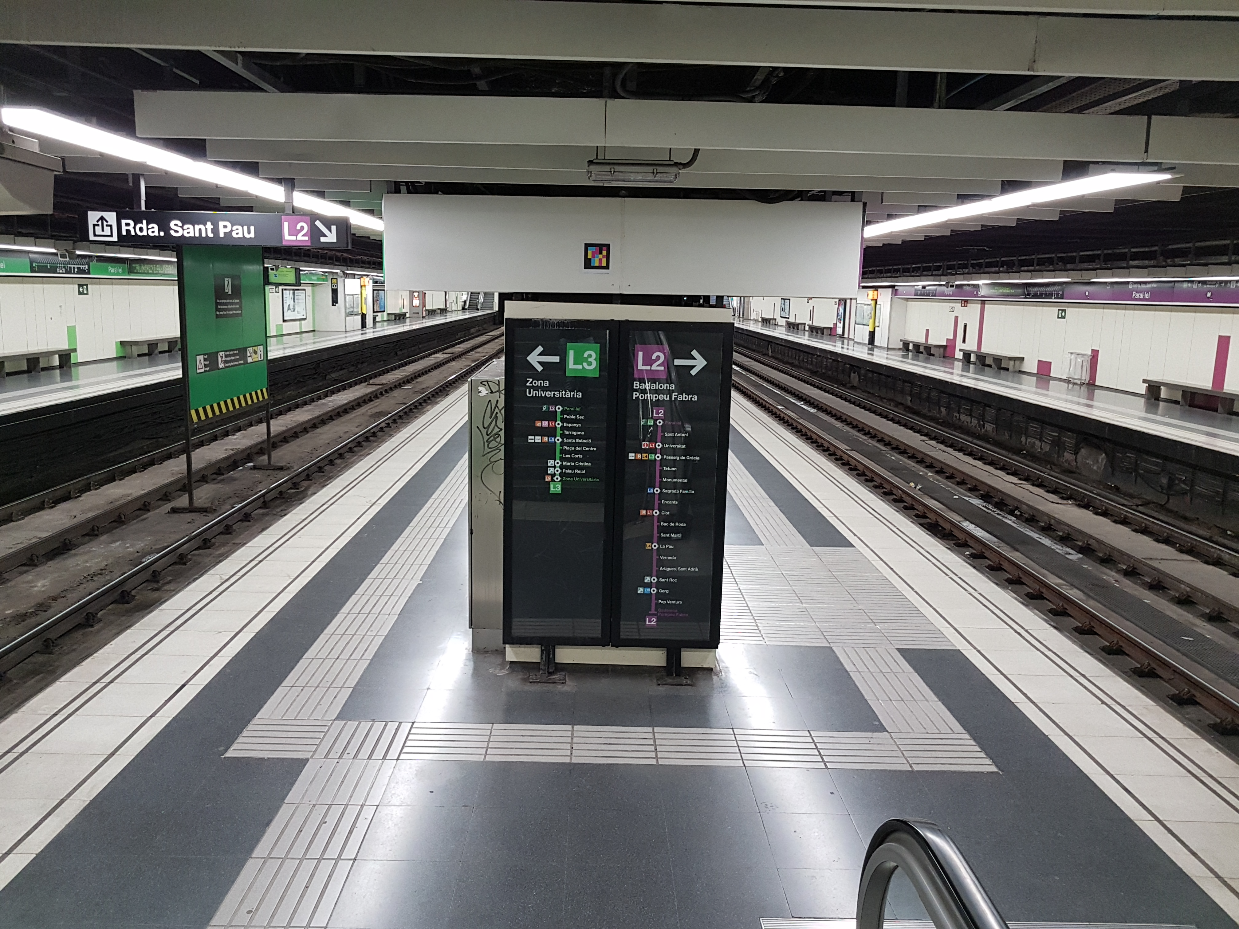 Estació de metro de Paral·lel de les línies L2 i L3 del metro de Barcelona